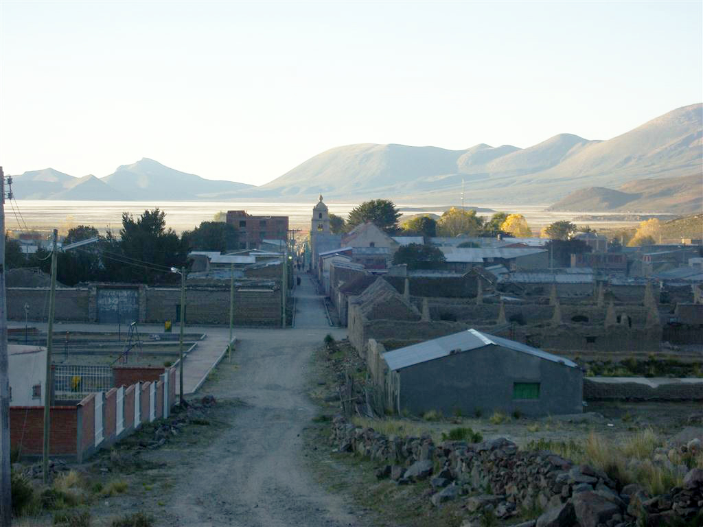 Población de Salinas Garci Mendoza, Oruro - Bolivia